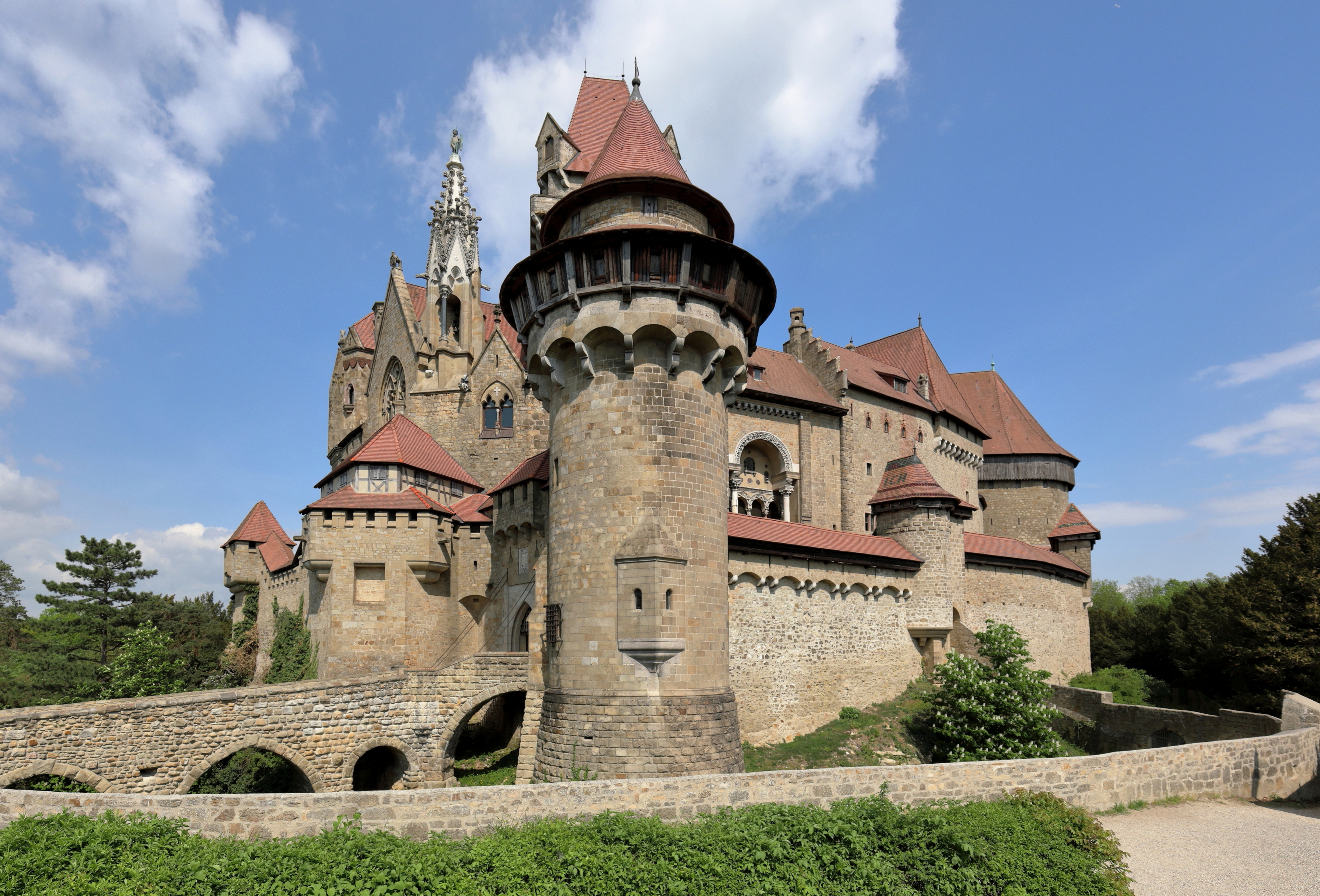 Südwestansicht der Burg Kreuzenstein in der niederösterreichischen Marktgemeinde Leobendorf. Die ursprüngliche Burg wurde im Zuge des 30-jährigen Krieges zerstört und anschließend als Baumaterial großteils abgetragen. Unter Graf Johann Nepomuk Wilczek erfolgte von 1874 bis 1906 ein Wiederaufbau der Burg als Museum für seine umfangreichen Kunstsammlungen. Die so entstandene Schauburg ist heute, ergänzt durch zahlreiche wiederverwendete mittelalterliche Bauteile und nach teilweiser Beseitigung der Brandschäden von 1915 und der Kriegsschäden von 1945, ein beliebtes Tourismusziel nördlich von Wien.